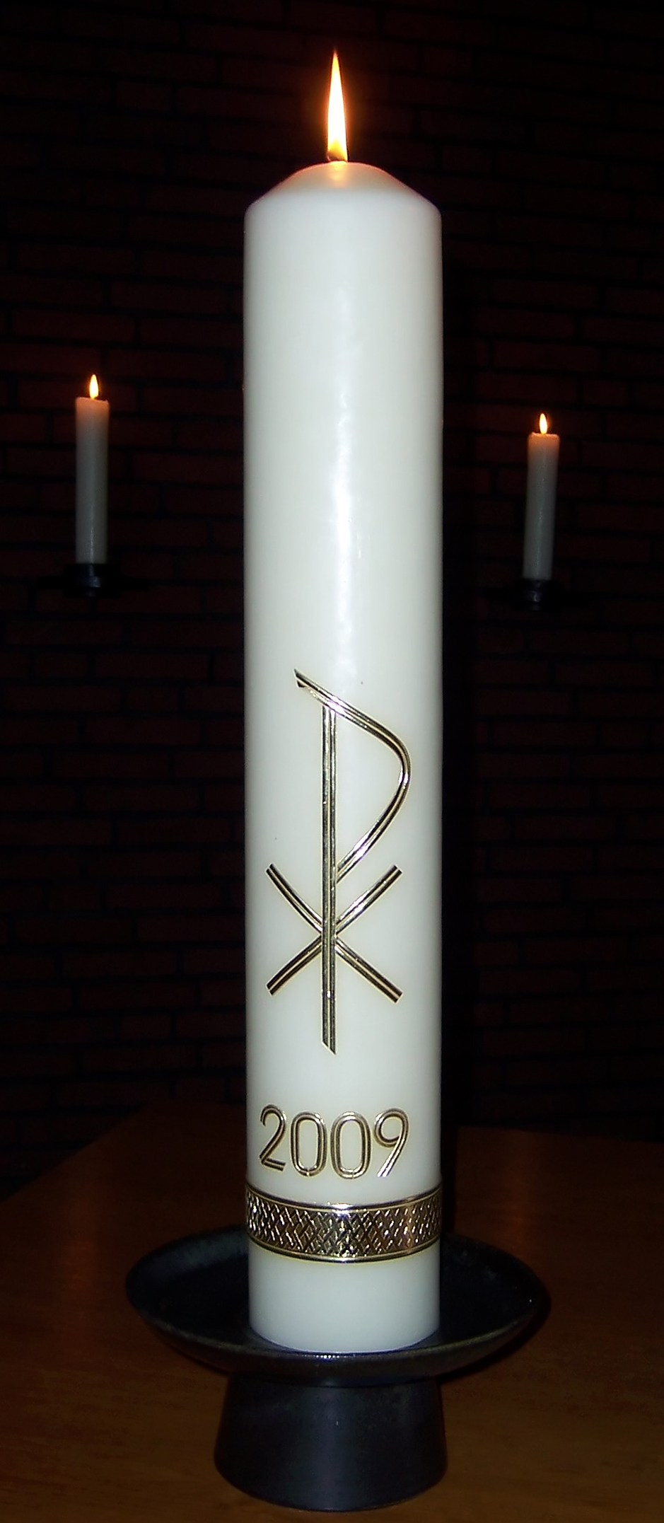 Osterkerze der Evangelischen Trinitatisgemeinde Bremen in der Blockdieker Kirche